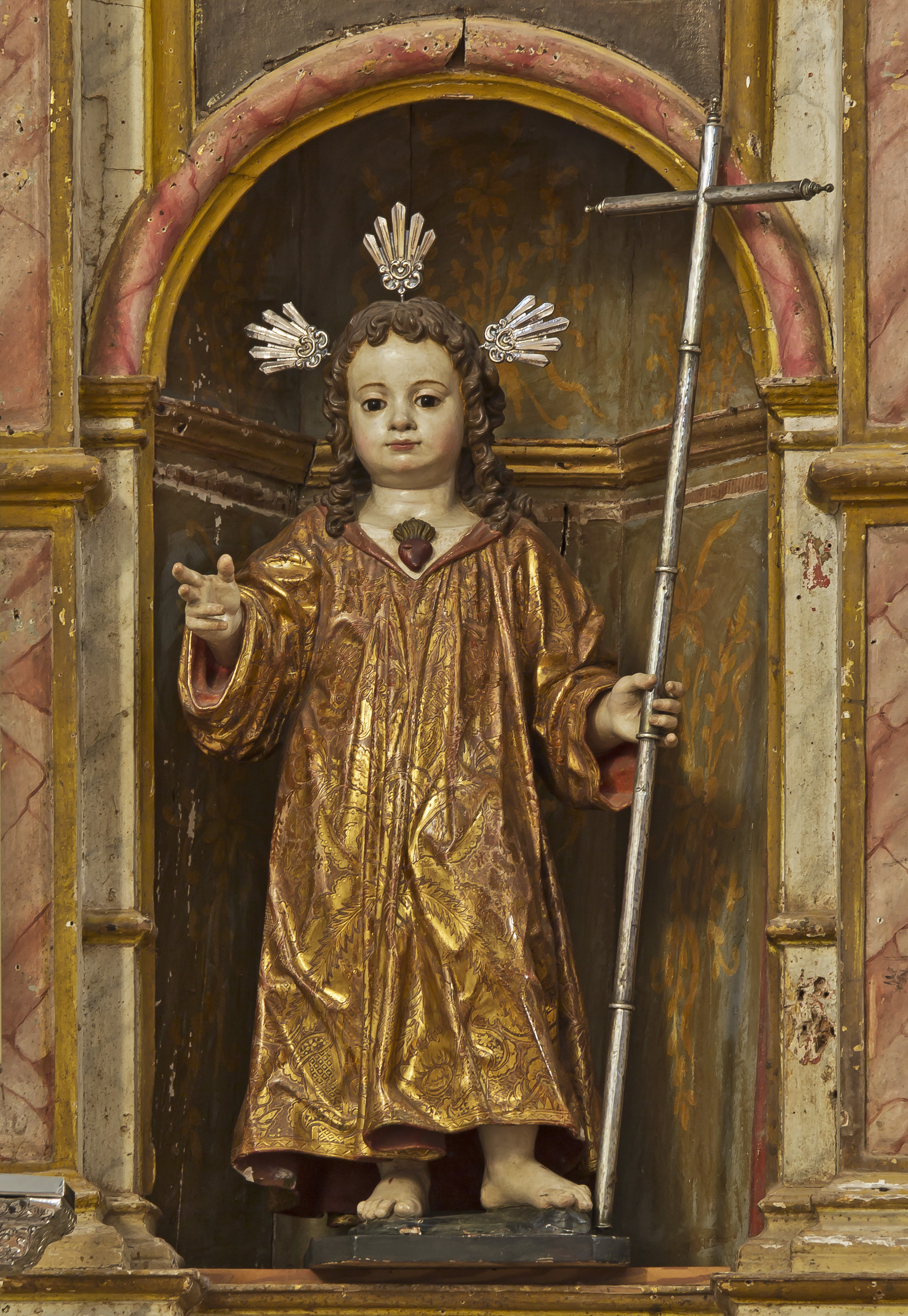 Iglesia de San Pedro Apóstol en El Sauzal. Niño Jesús, autor anónimo, siglo XVII. Esta imagen supuestamente abriría las puertas de la iglesia cuando ésta estaba cerrada para que María de León Bello fuera a rezar en ella.